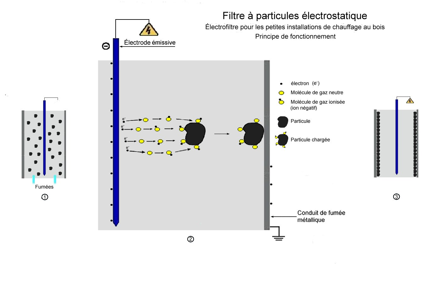 Ce type d'électrofiltre convient aux petites installations de chauffage au bois : poêles, cheminées, poêles à granulés (pellets), chaudières, etc. 1. Les particules sortent par le conduit d'évacuation des gaz de fumée. 2. et 3. Positionnée au centre du conduit, une électrode sous haute tension émet des électrons qui ionisent les molécules de gaz. Les molécules ionisées se fixent sur les particules. Dans le champ électrostatique créé par l'électrode, les particules, chargées négativement, sont entraînées sous l’effet des forces électrostatiques vers les parois internes du conduit où elles s'agglutinent et forment des flocons qui sont évacués lors de la maintenance effectuée par le ramoneur.